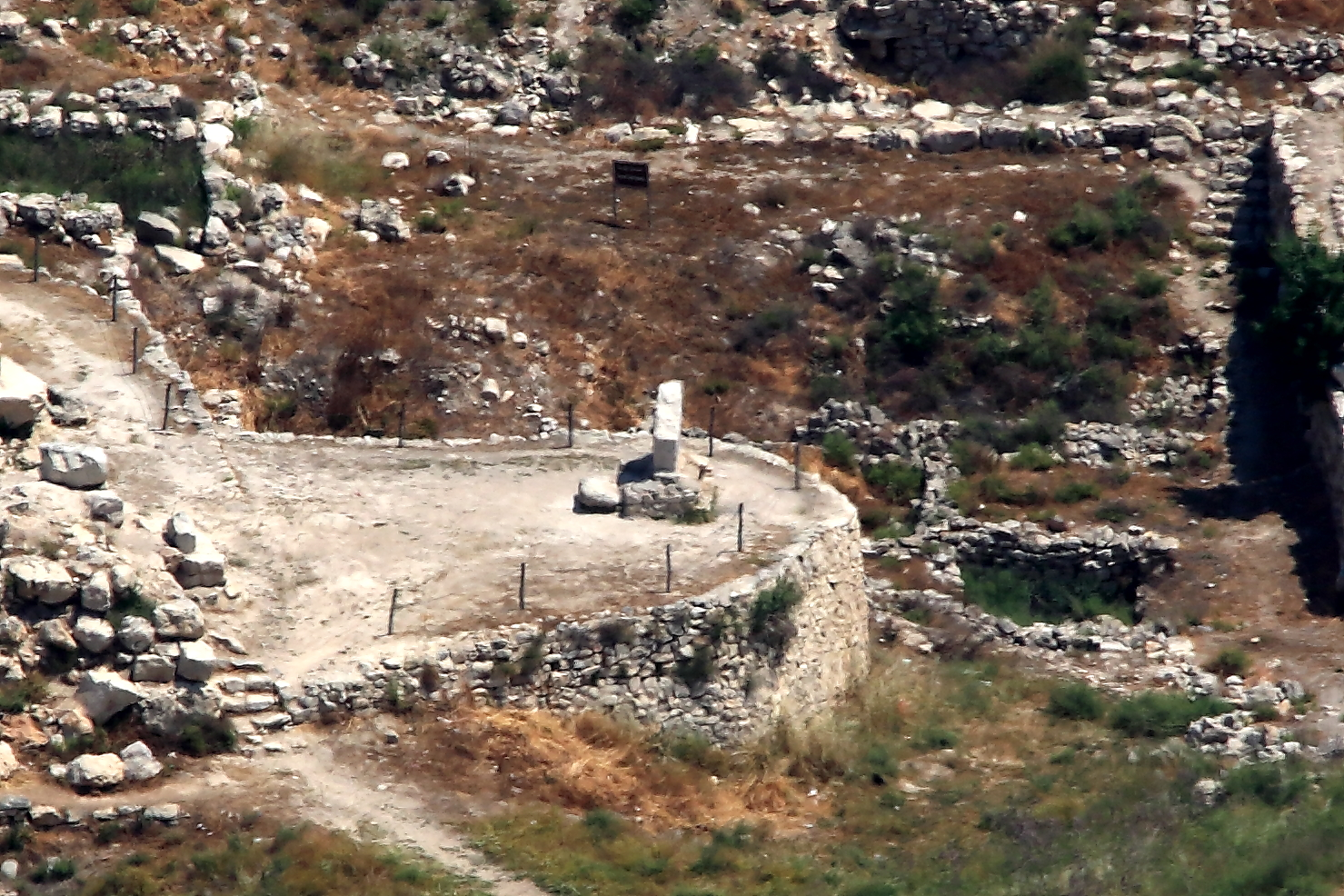 אבן זו, שנמצאת בסמוך לשרידי חומת 'שכם העתיקה' שבפאתי העיר שכם, מיוחסת ל'אבן הגדולה' המתוארת בסוף מעמד כריתת הברית בשכם.